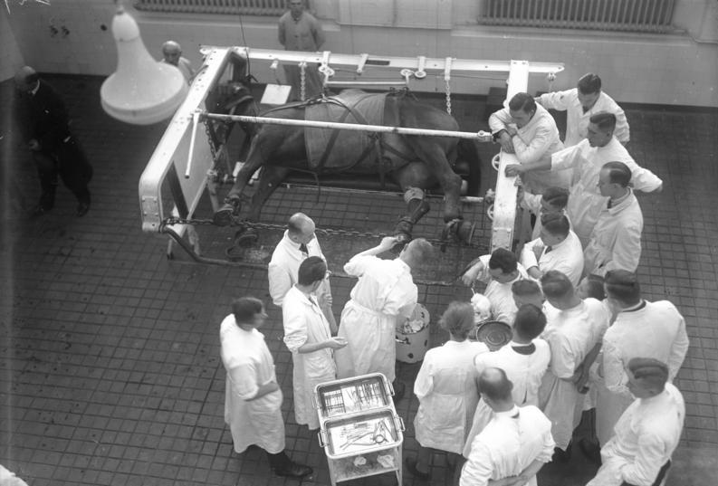 Studenten lernen! Blick in den modernen Operationssaal der Tierärztlichen Hochschule in Berlin. Die Studenten umstehen den drehbaren Operationsstuhl während der Operation eines Pferdes.